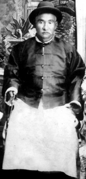 Монгол: Лаварын Сумъяа